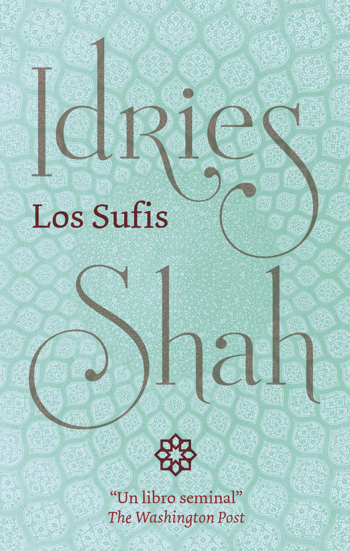 Ilustración de Renata Alvares